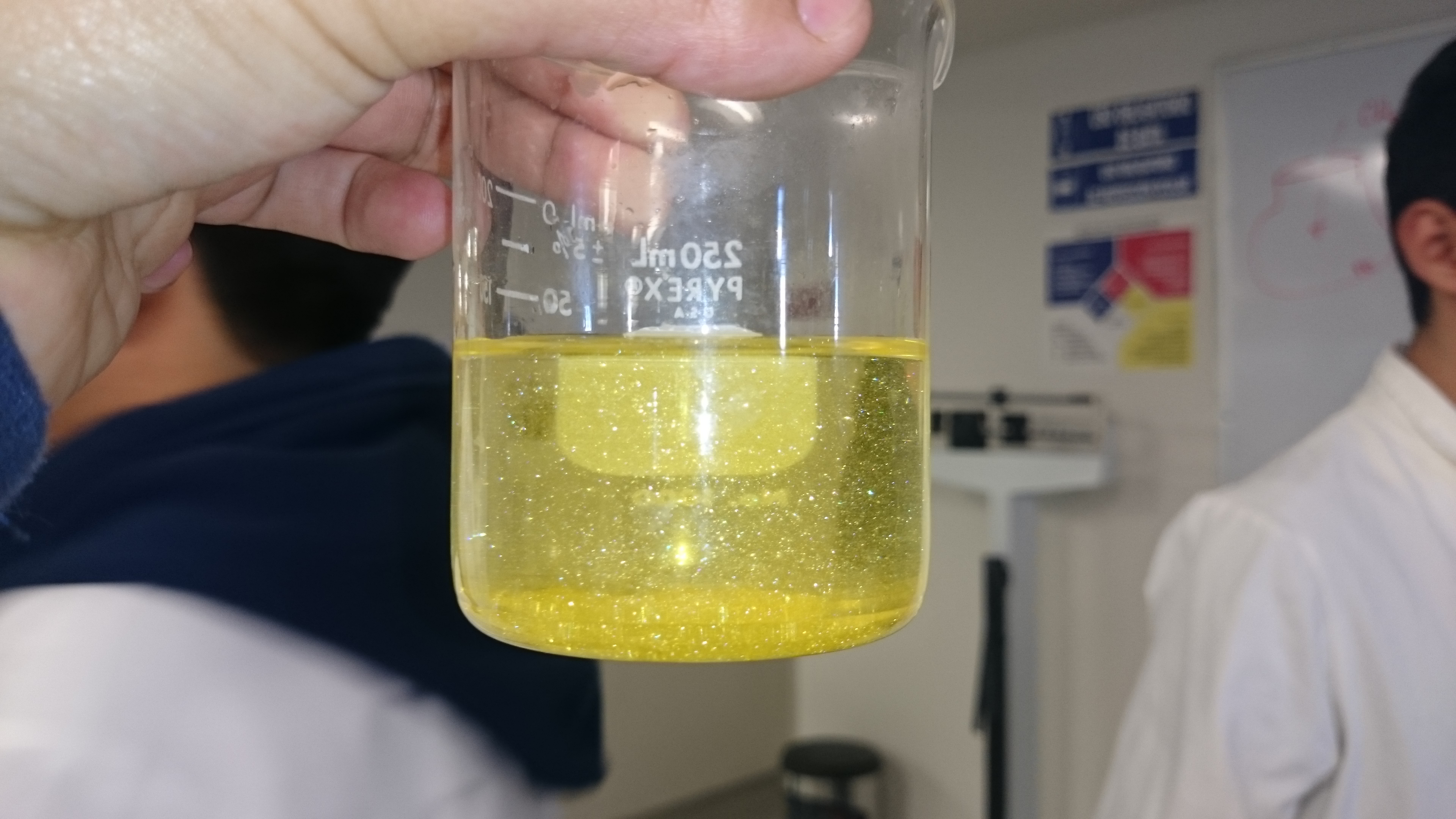 Al realizar una práctica de extracción de plomo en vasijas de barro, se obtuvo un líquido amarillo y brillante. El color amarillo indica la presencia de plomo en la vasija de barro utilizada en dicho experimento.